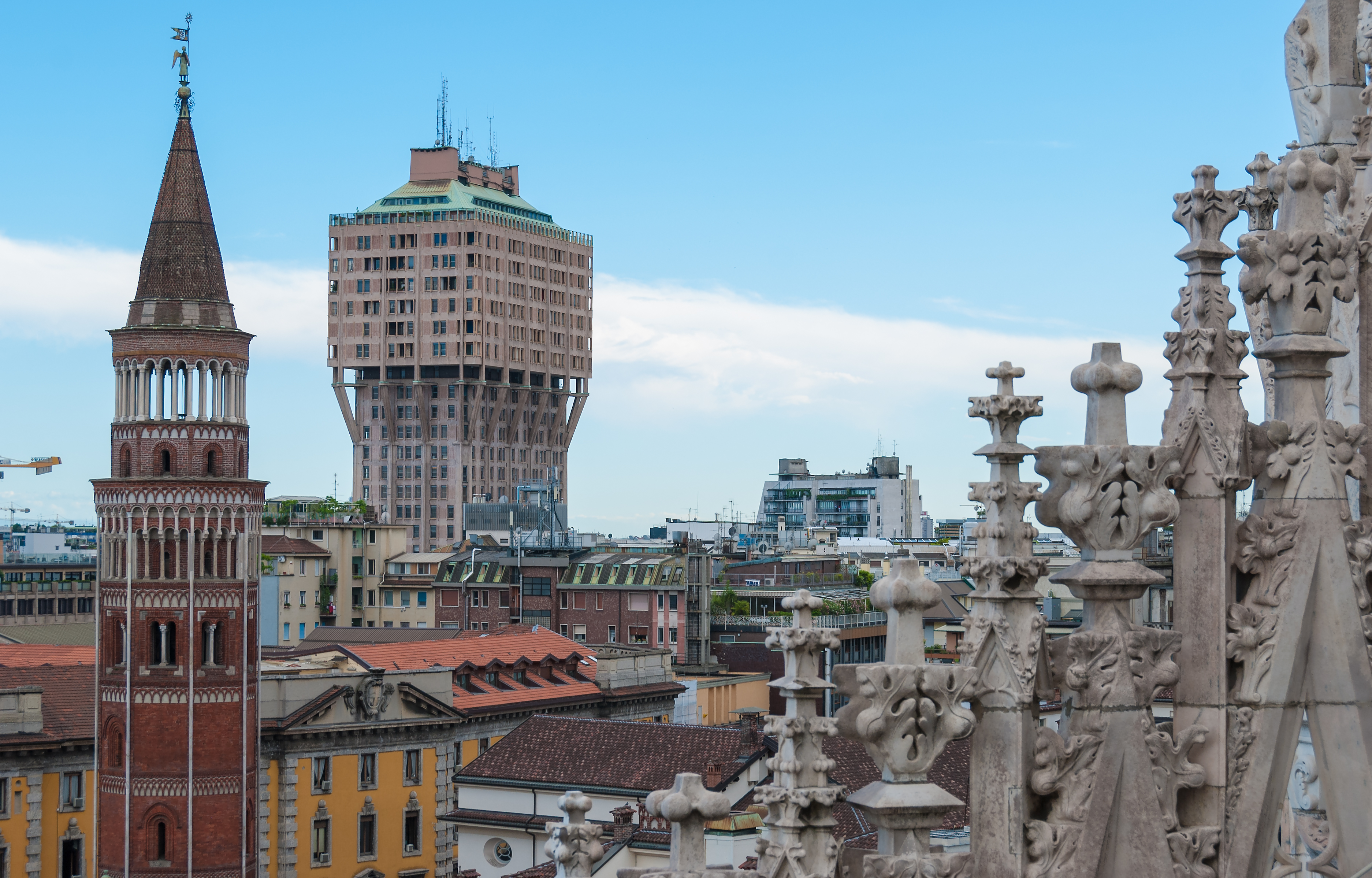 Duomo di Milano